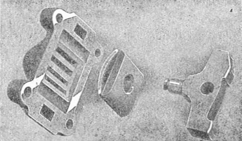 Arc valve, tappet and valve chest (Rankin Kennedy, Modern Engines, Vol VI).jpg